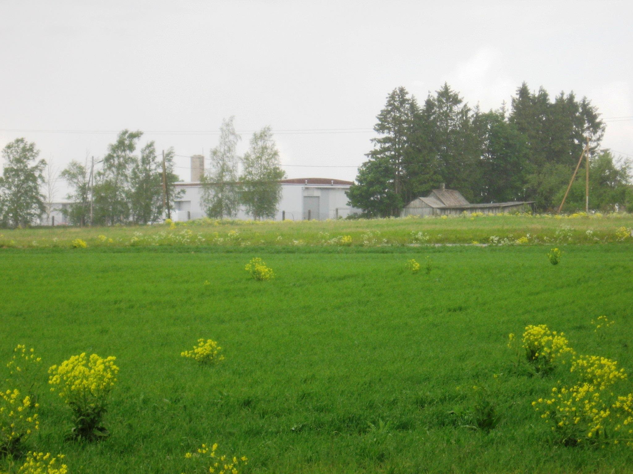 Müüsleri küla (vaate Kilplala suunast)